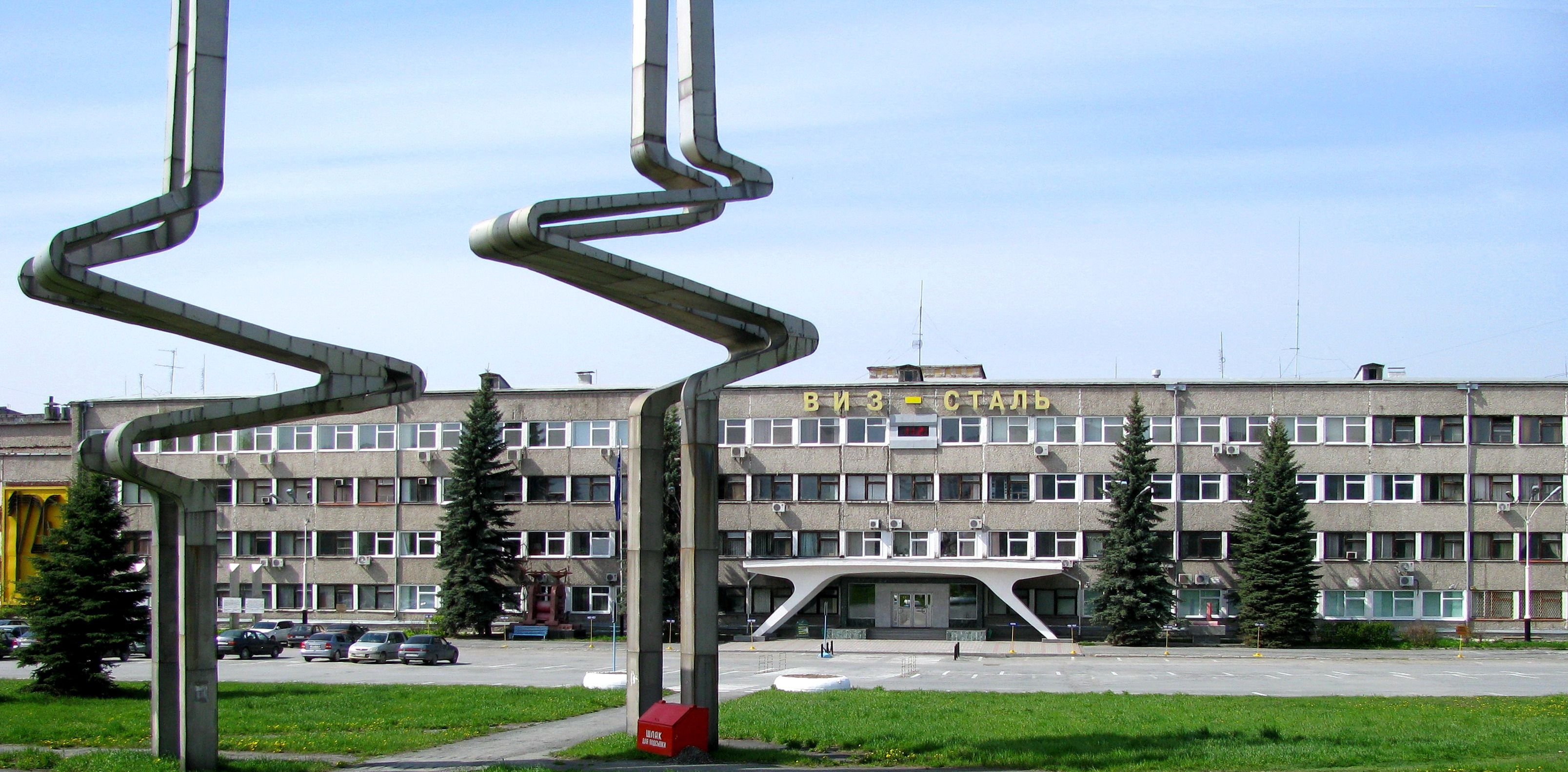 Заводоуправление ООО «ВИЗ-Сталь»